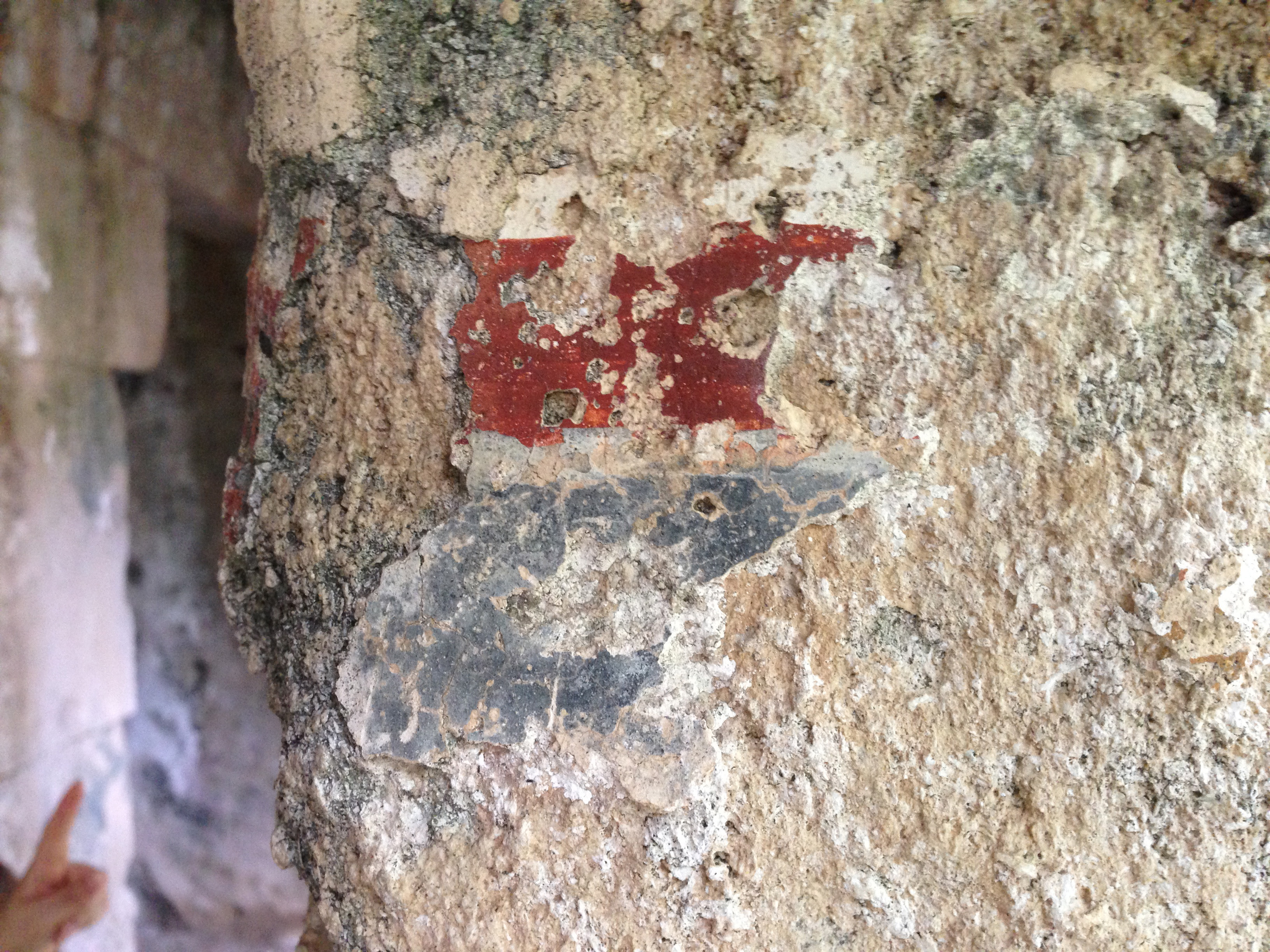 Traccia di affresco, San Basilio